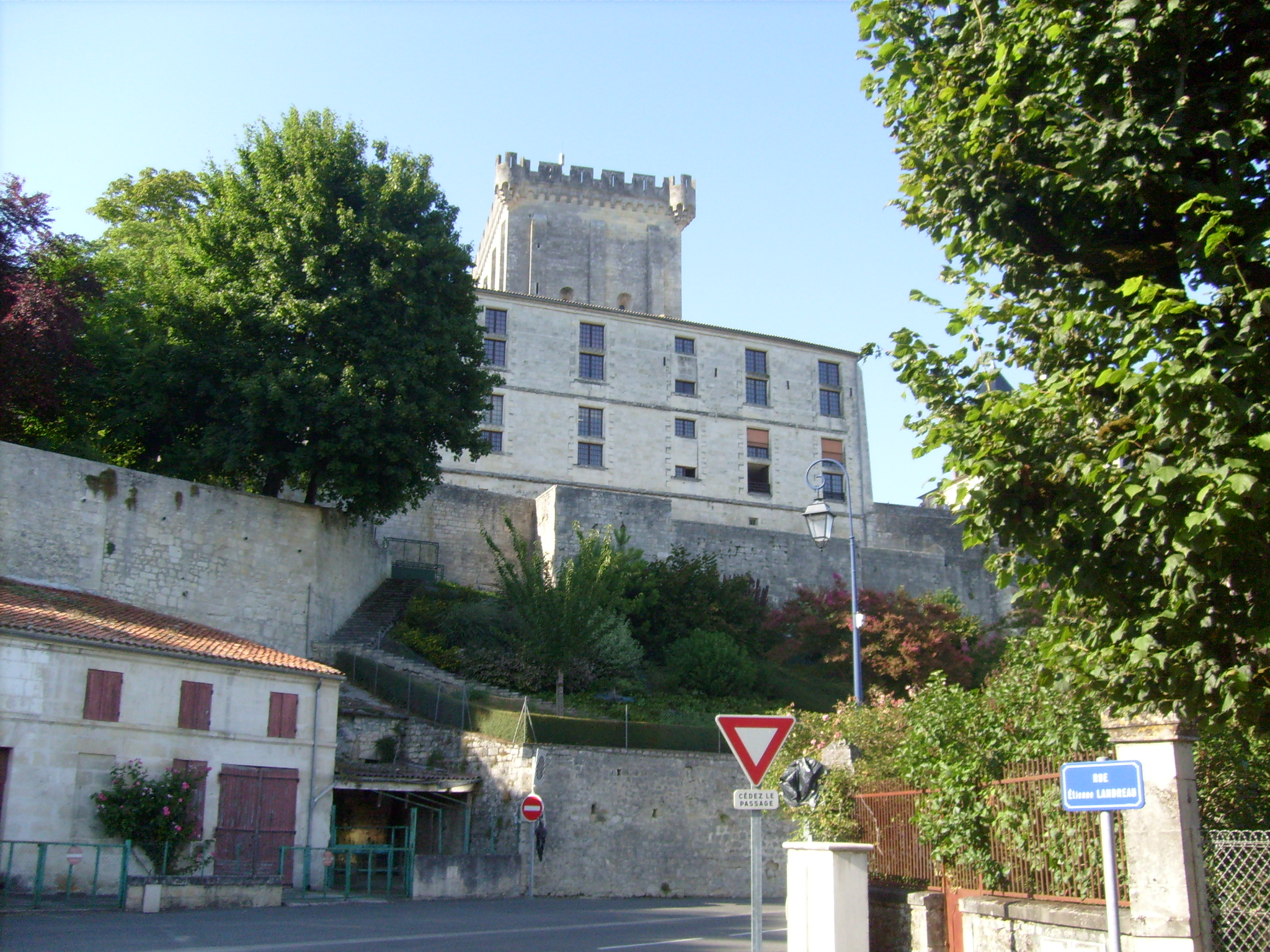 Une rue de Pons